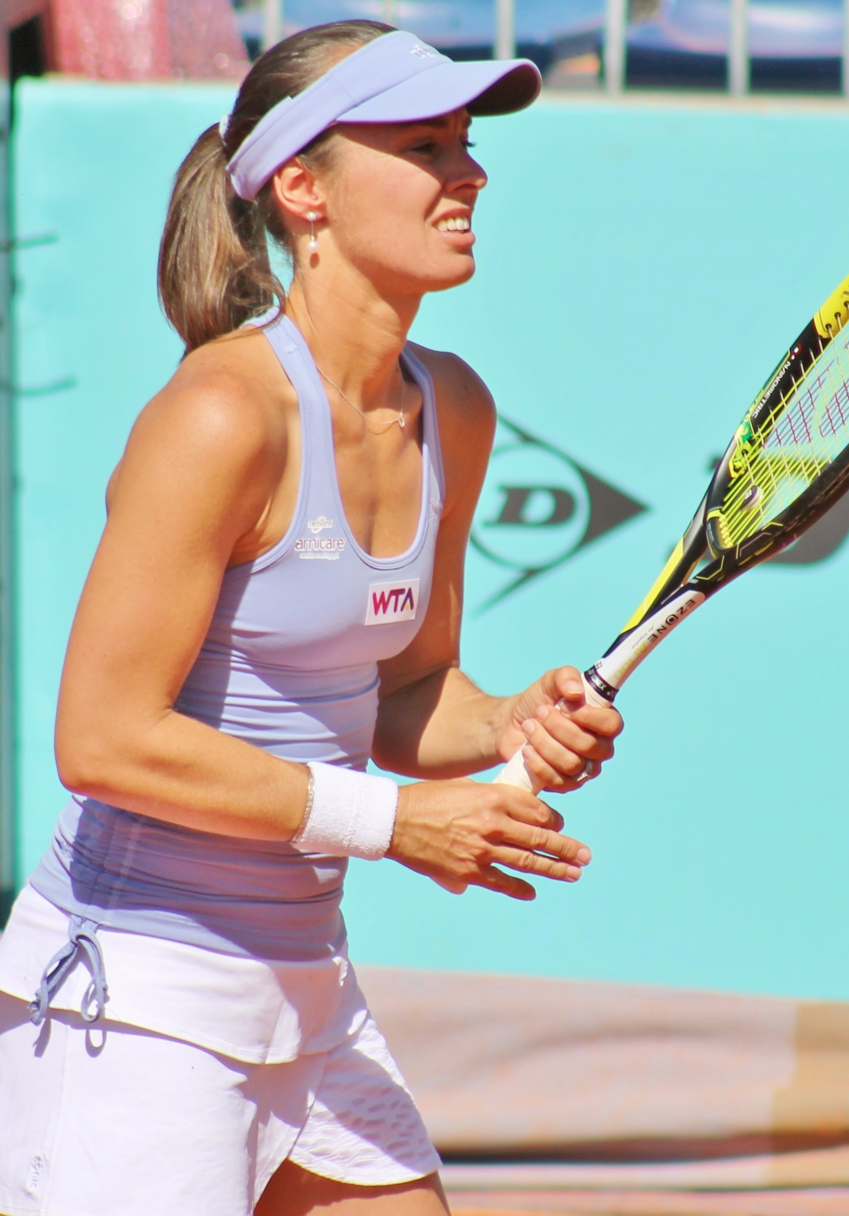 Martina Hingis at Madrid 2014 (3)